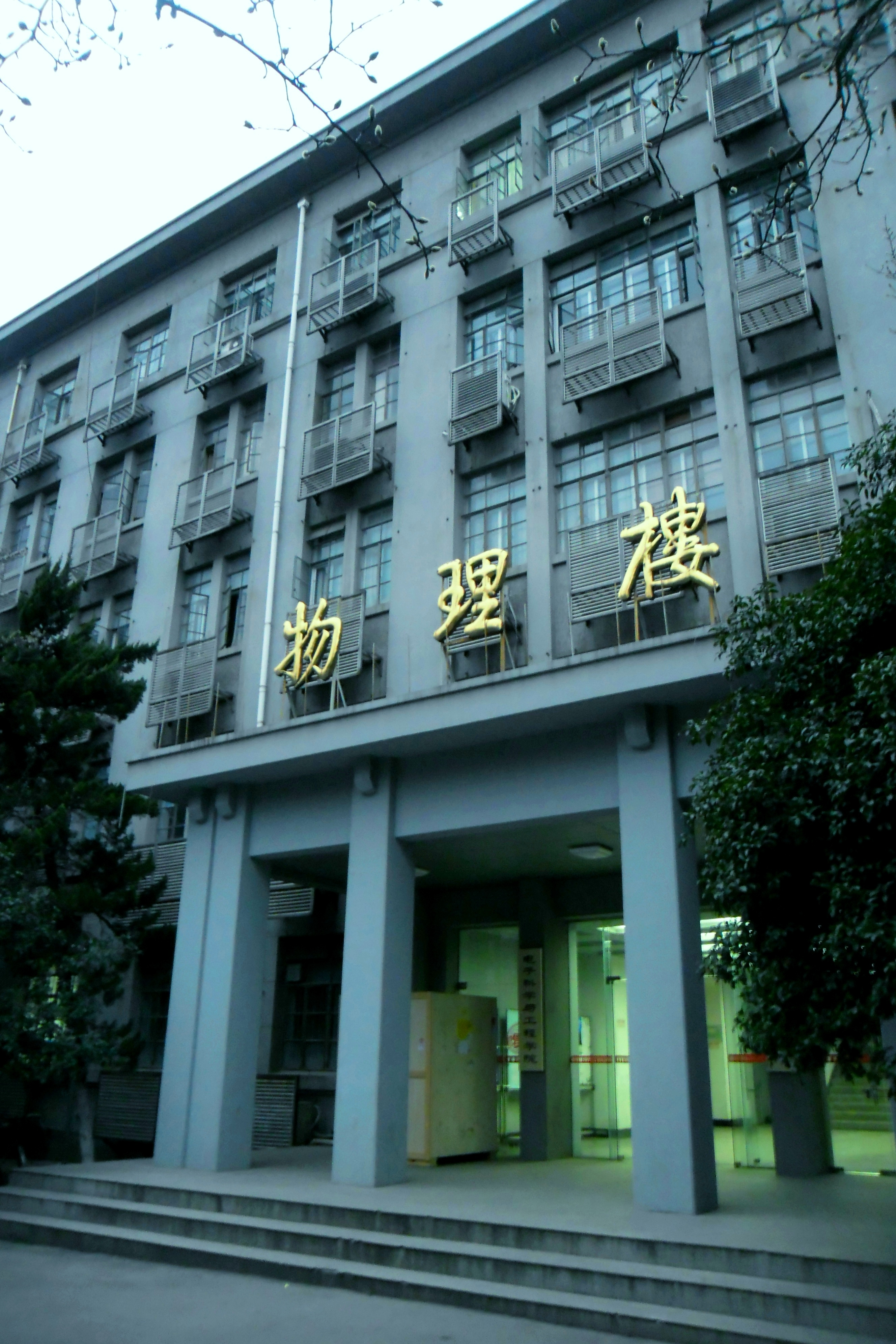 中文（中国大陆）: 江苏省南京市